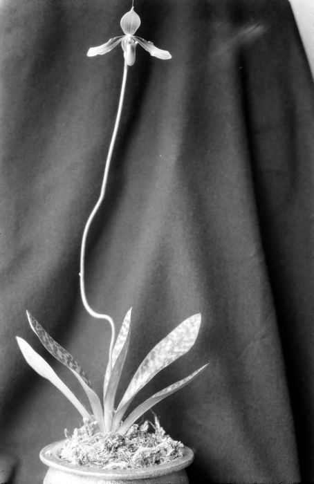 Repronegatief. Aardorchidee Paphiopedilum hookerae